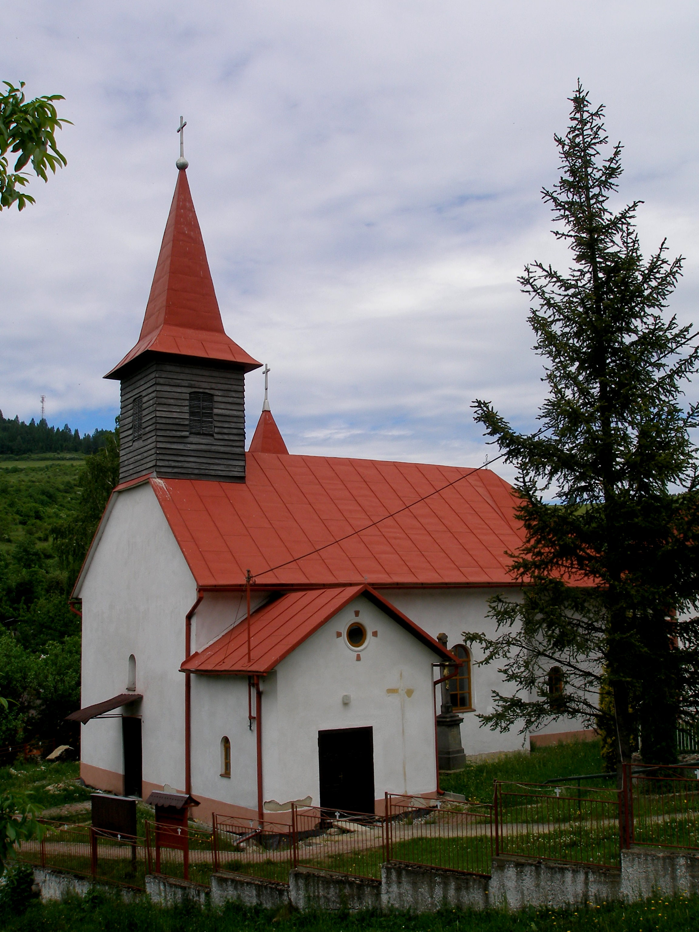 Obec Vysoká okres Sabinov